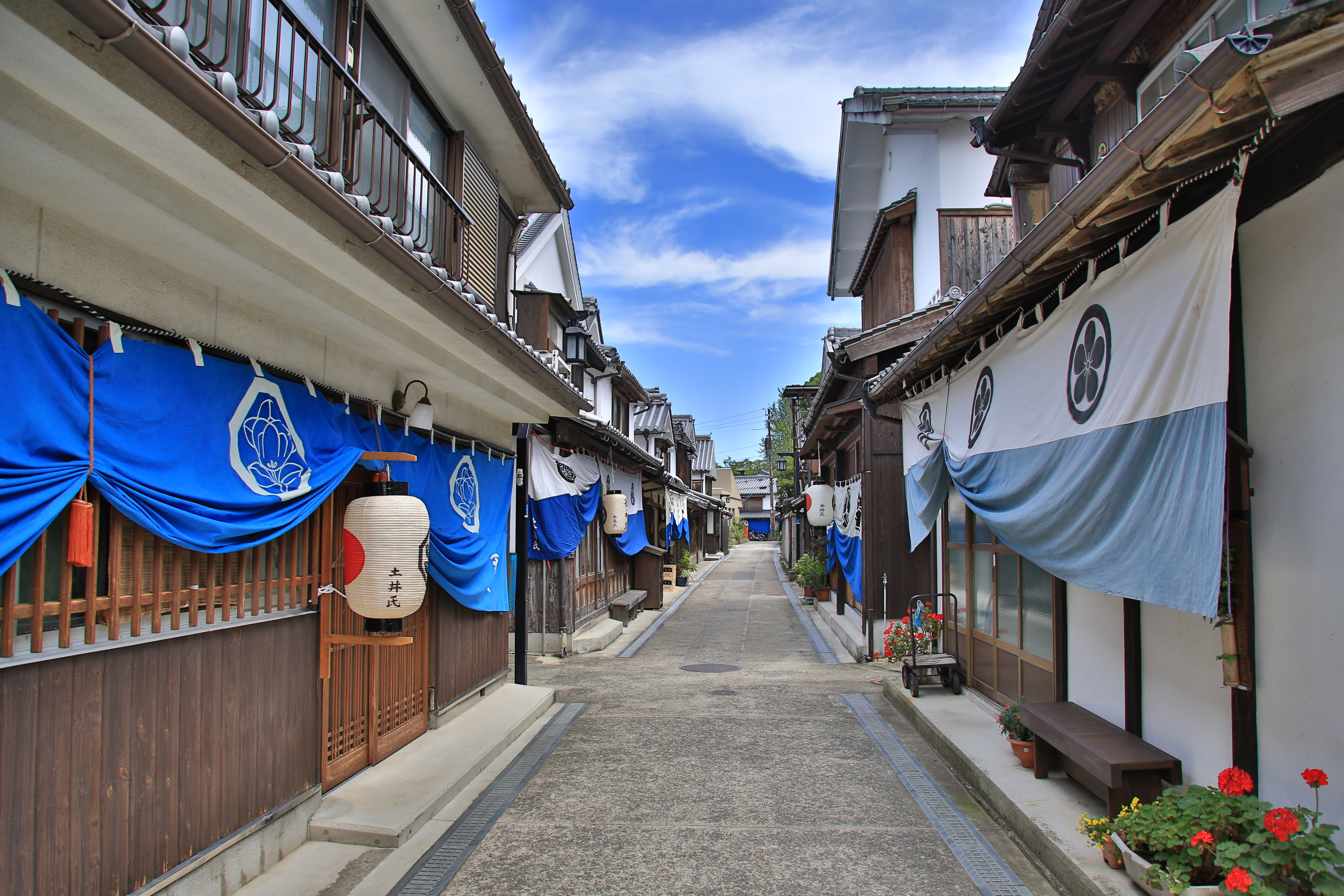 広島県呉市豊町御手洗のまち並み